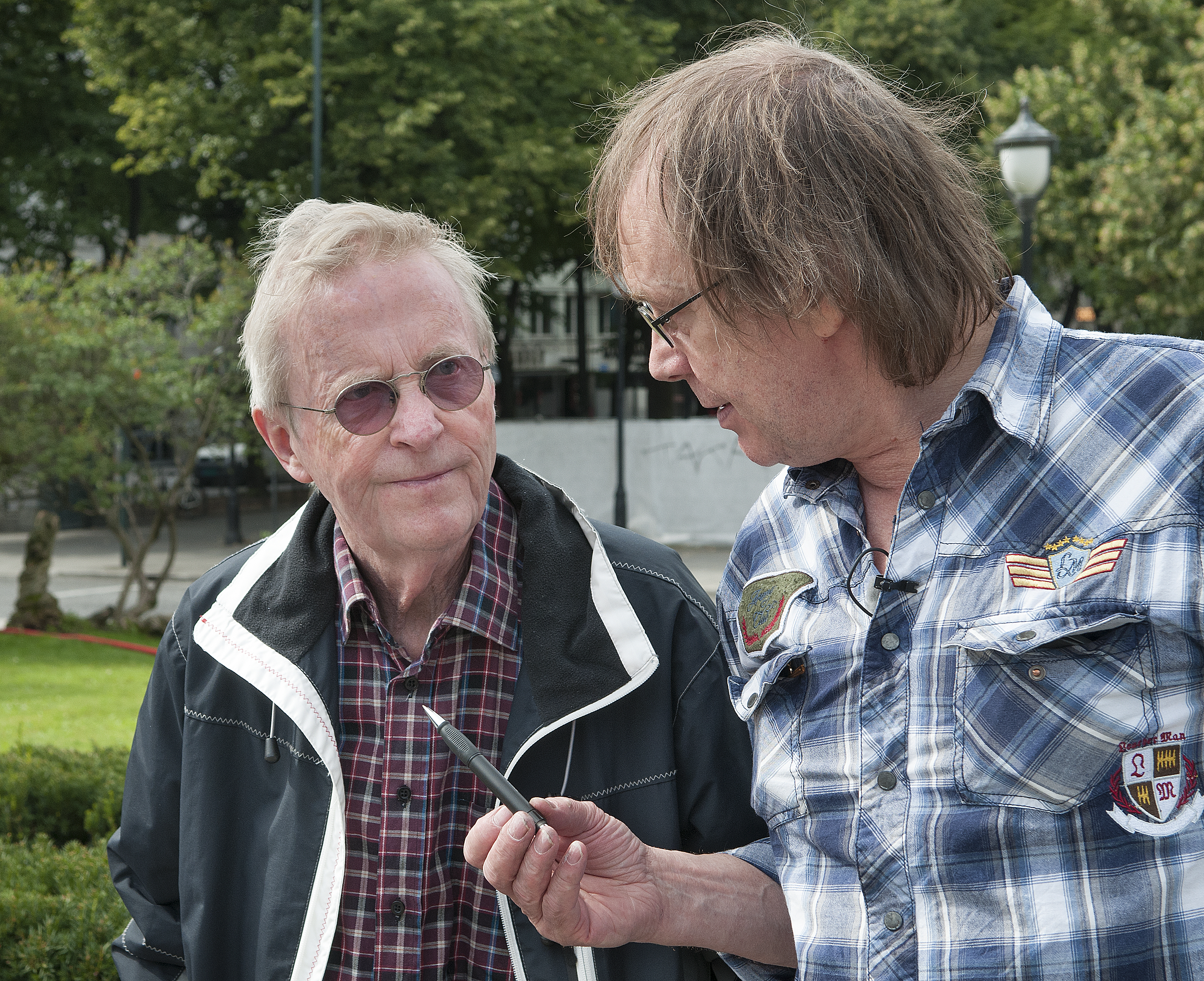 Tor Erling Staff i samtale med Øystein Meier Johannessen under aksjonen på Eidsvoll Plass foran Stortinget 21 August 2013 mot oljeboring utenfor Lofoten, Vesterålen og Senja.